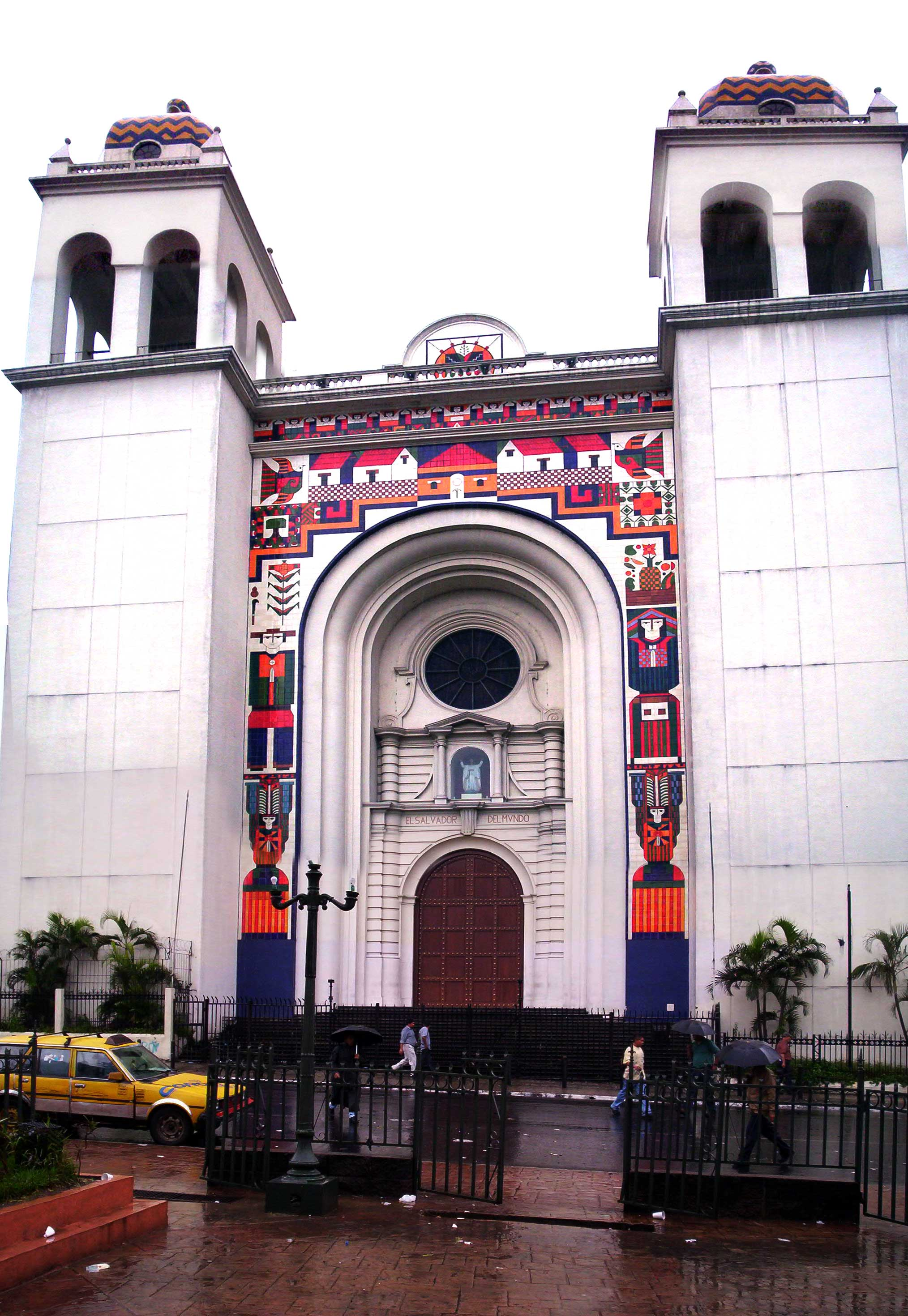 Esta es una iglesia católica de San Salvador, Centroámerica